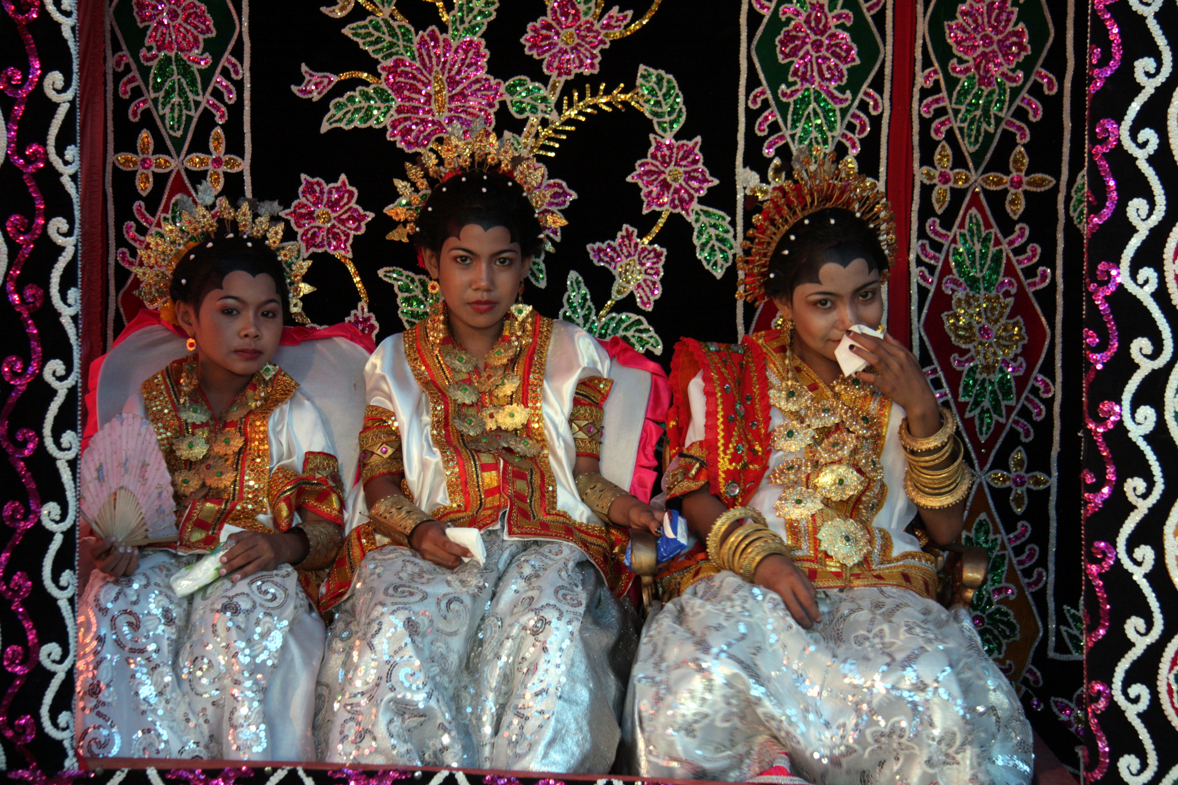 les suivantes de la mariée aux célèbes dans un mariage traditionel